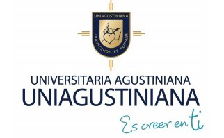 Logo de la UNIAGUSTINIANA